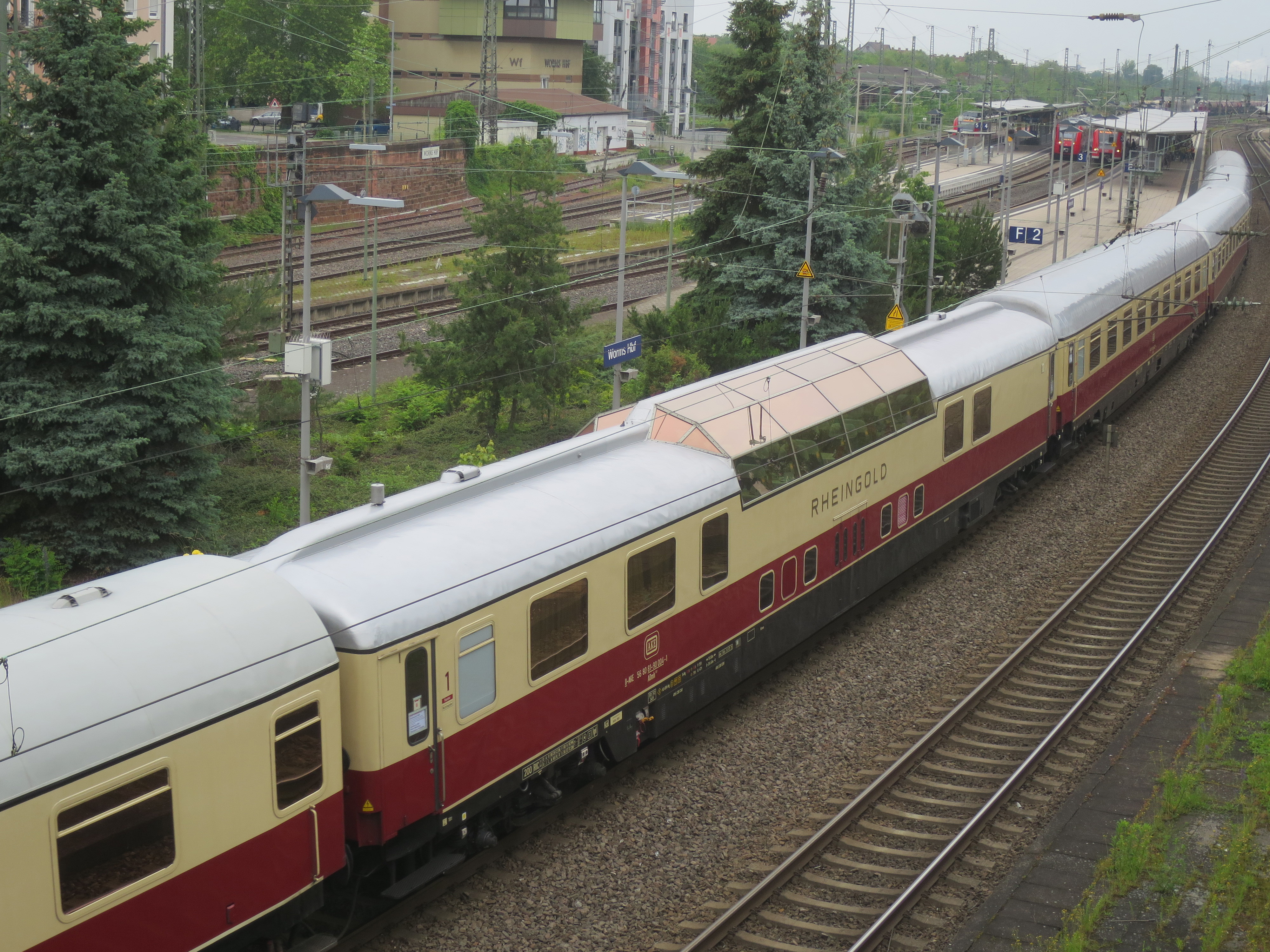 Aussichtswagen des historischen TEE-Zuges der AKE-Eisenbahntouristik in Worms Hauptbahnhof